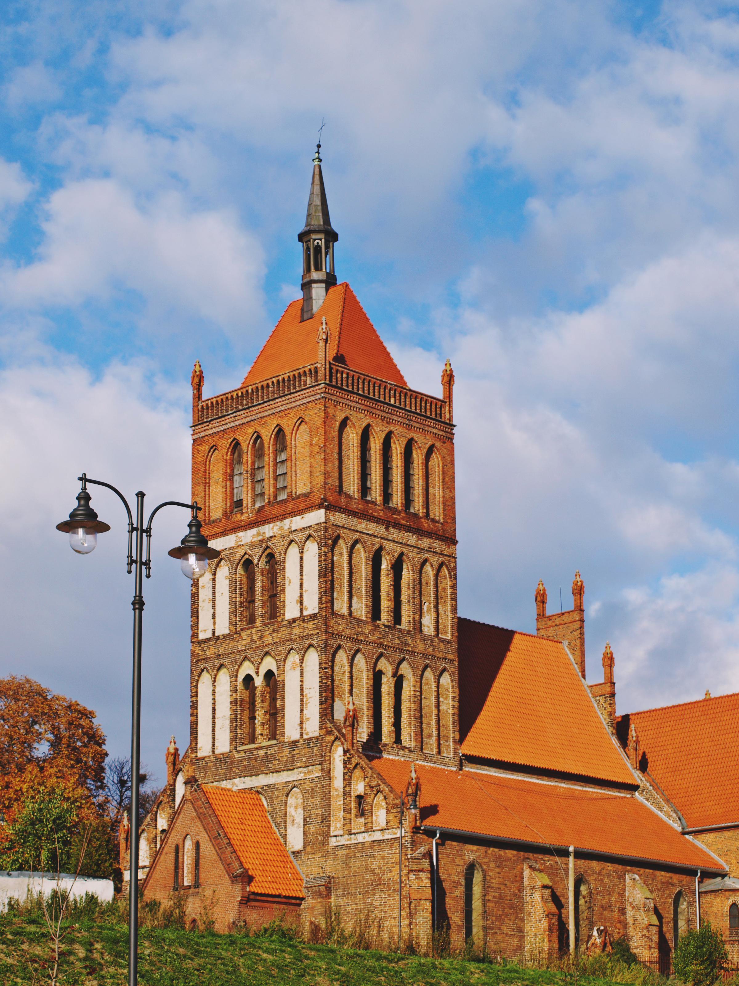 Chełmża, kościół par. pw. św. Mikołaja, XIII-XV, XIX